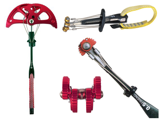 Enkele modellen van friends (bij klimmateriaal)